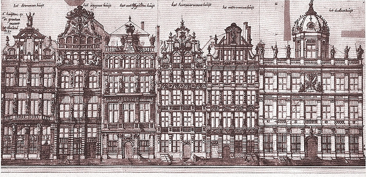 Maisons de la Grand-Place de Bruxelles, d'après F.J. De Rons dessins et aquarelles exécutés de 1729 à 1749. De gauche à droite: Le Renard, Le Cornet, La Louve, Le Sac, La Brouette, Le Roi d'Espagne et Saint Jacques (sous une même façade).